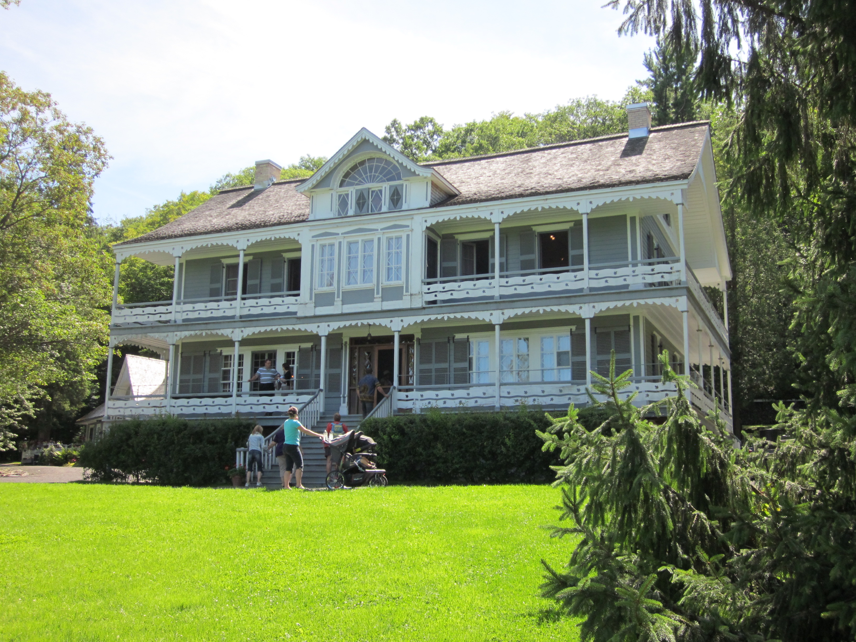 La maison de Pointe-Platon au domaine Joly-De Lotbinière, classée monument historique en 1999.